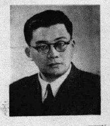 中文（中国大陆）: 立法委員楊公達的戶籍照片